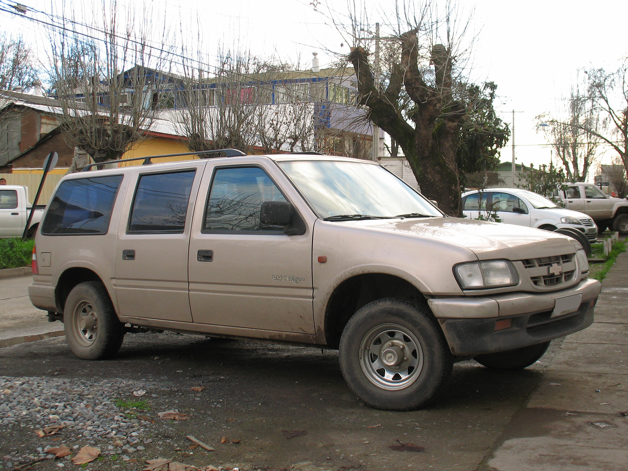 Chevrolet Luv 2.2 Wagon 2001